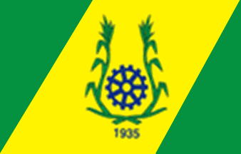 Bandeira de João Alfredo, Pernambuco.